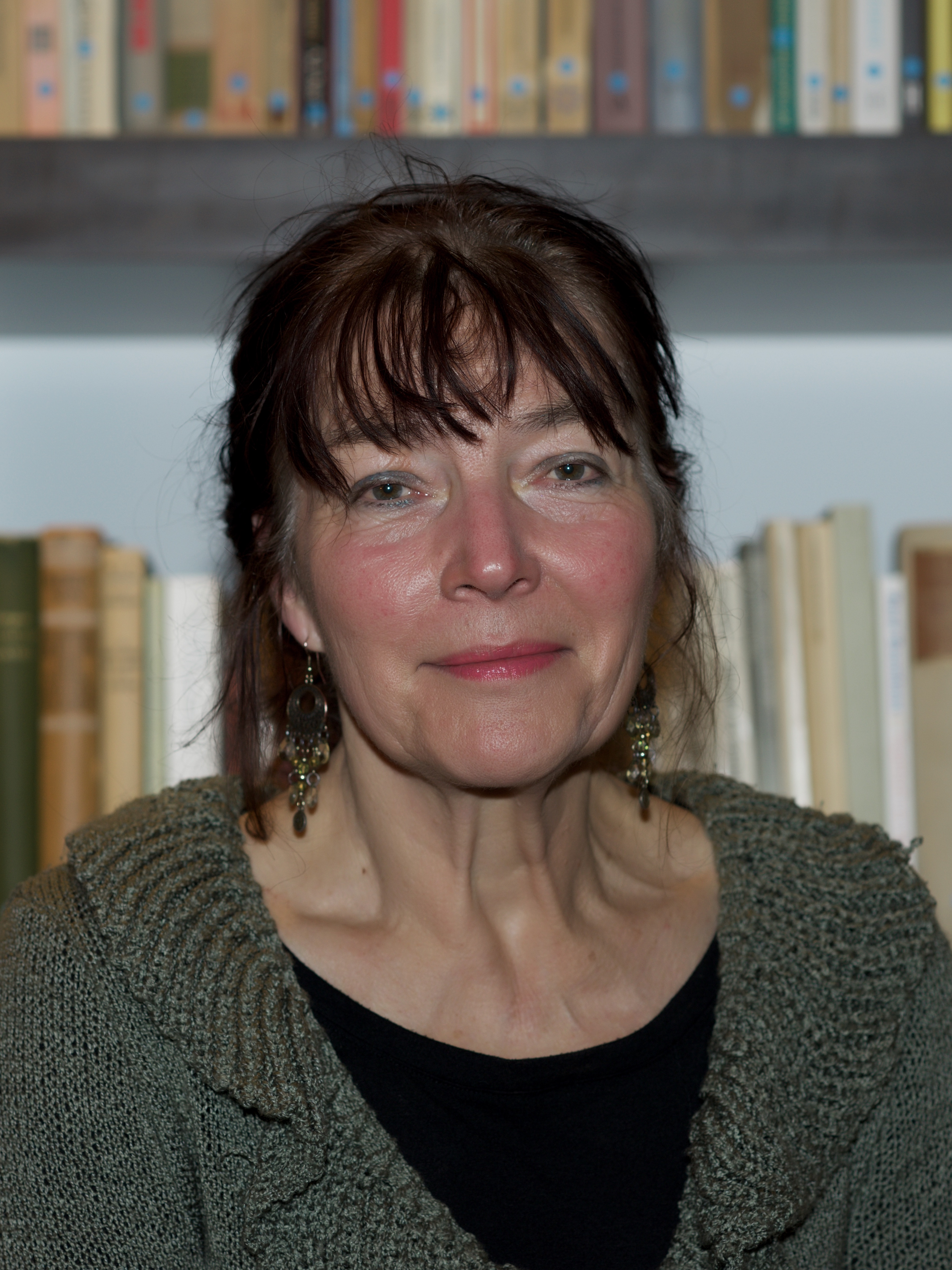 Portret filosofe Miriam van Reijen